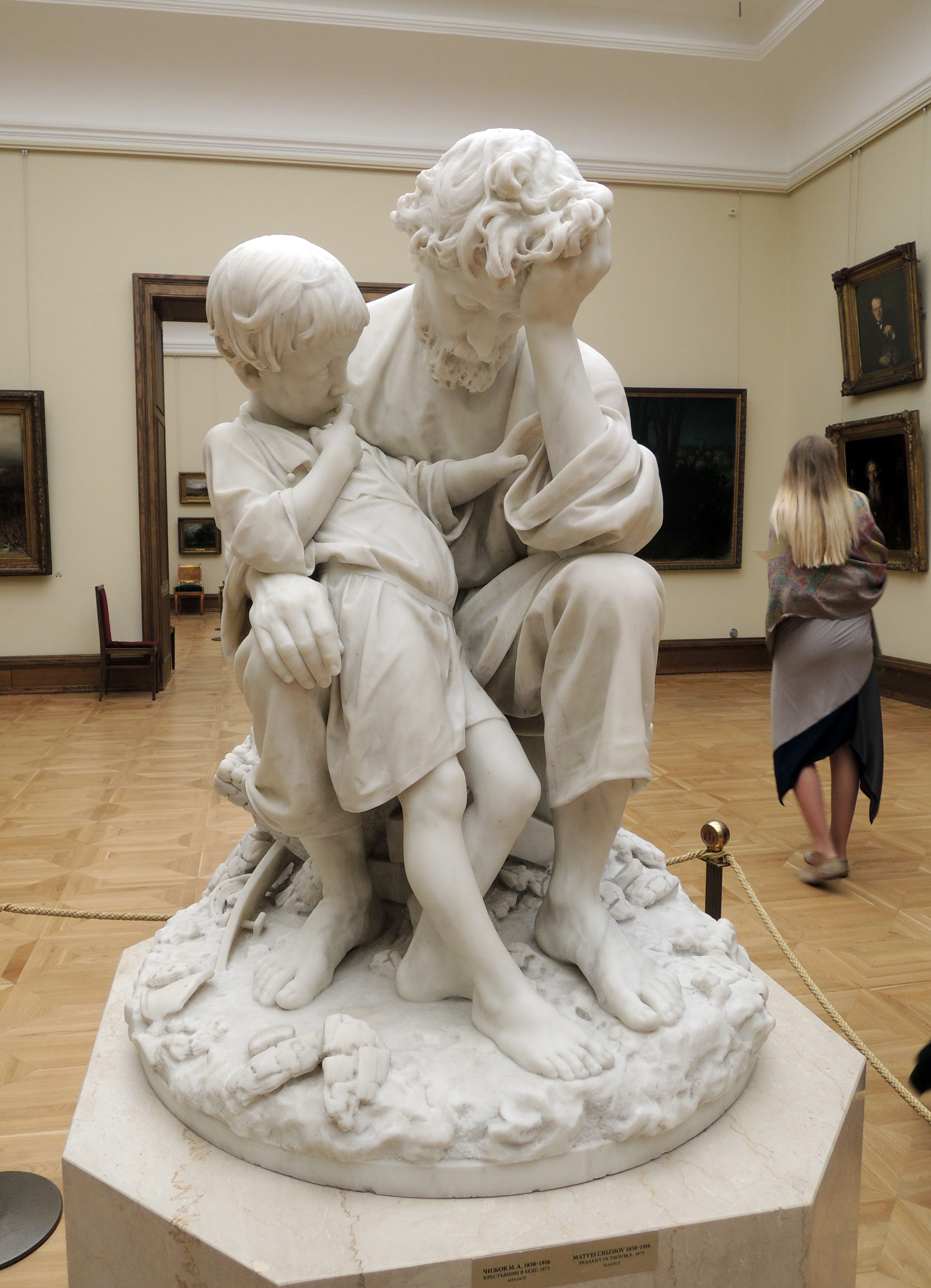 М.А. Чижов. «Крестьянин в беде», 1873, ГТГ